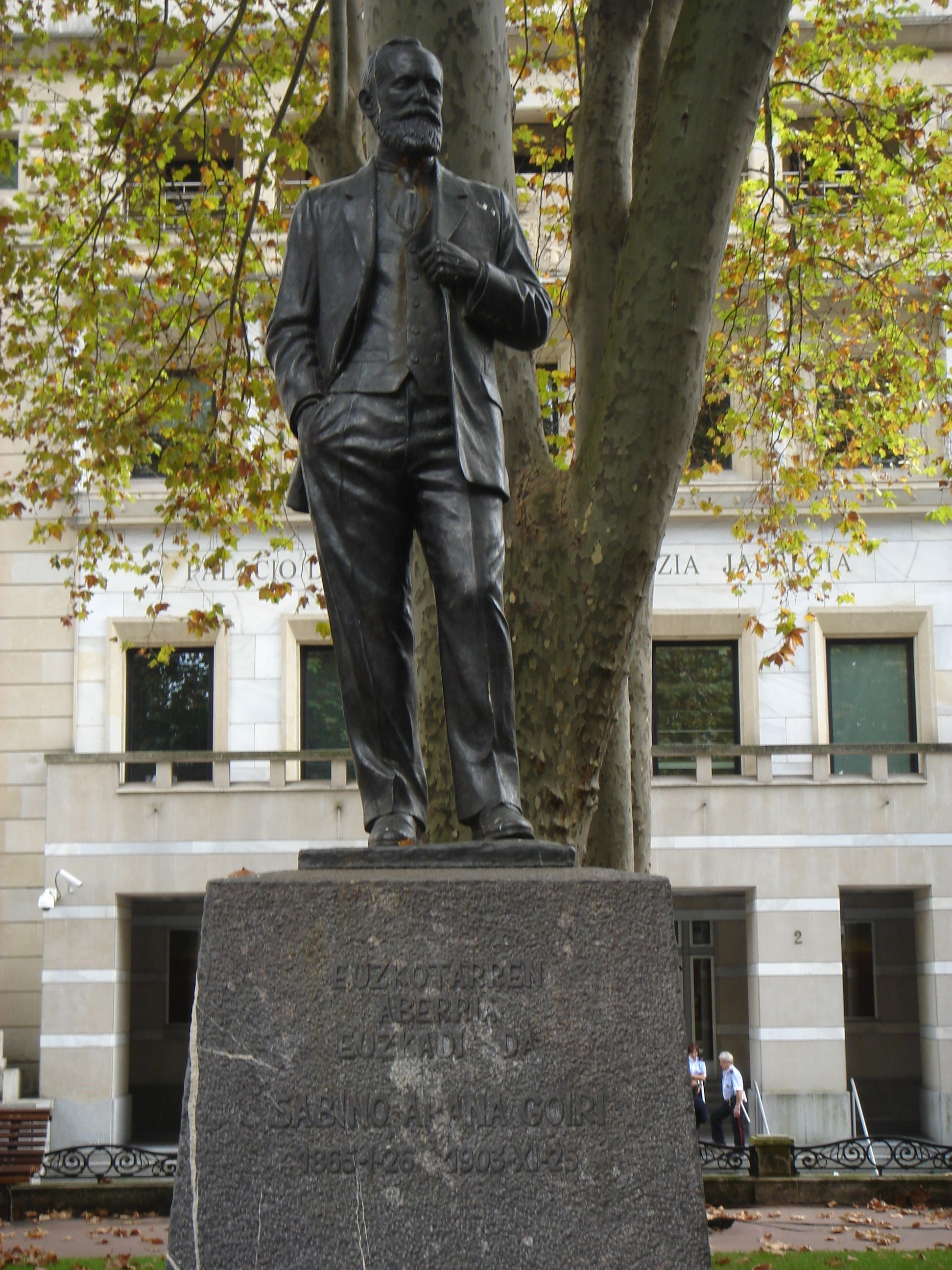 Statue de Sabino Policarpo Arana Goiri à Bilbao Espagne